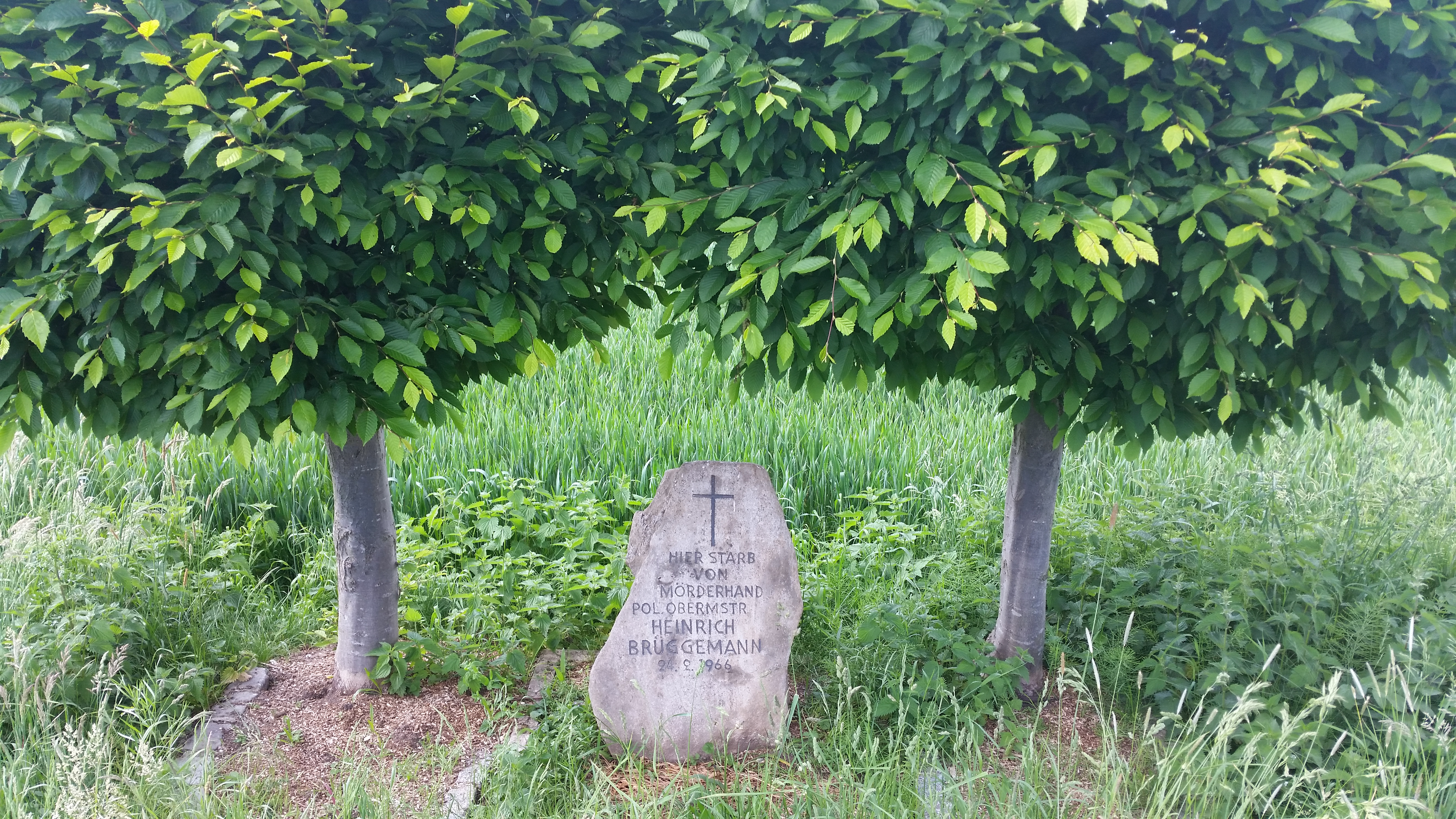 Hier ist ein Bild von der Gedenkstätte an der Heinrich Brüggemann von Bruno Fabeyer niedergeschossen wurde.